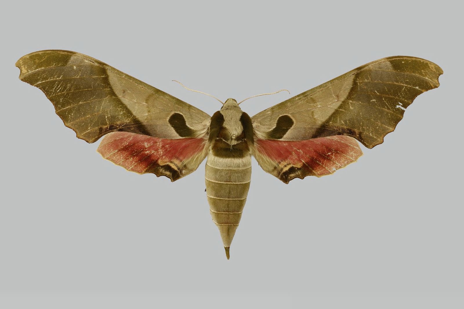 Adhemarius blanchardorum, female, upperside. San Luis Potosi, Route allant de Charco Blanco a GuadalcÃ¡zar pk 10,4